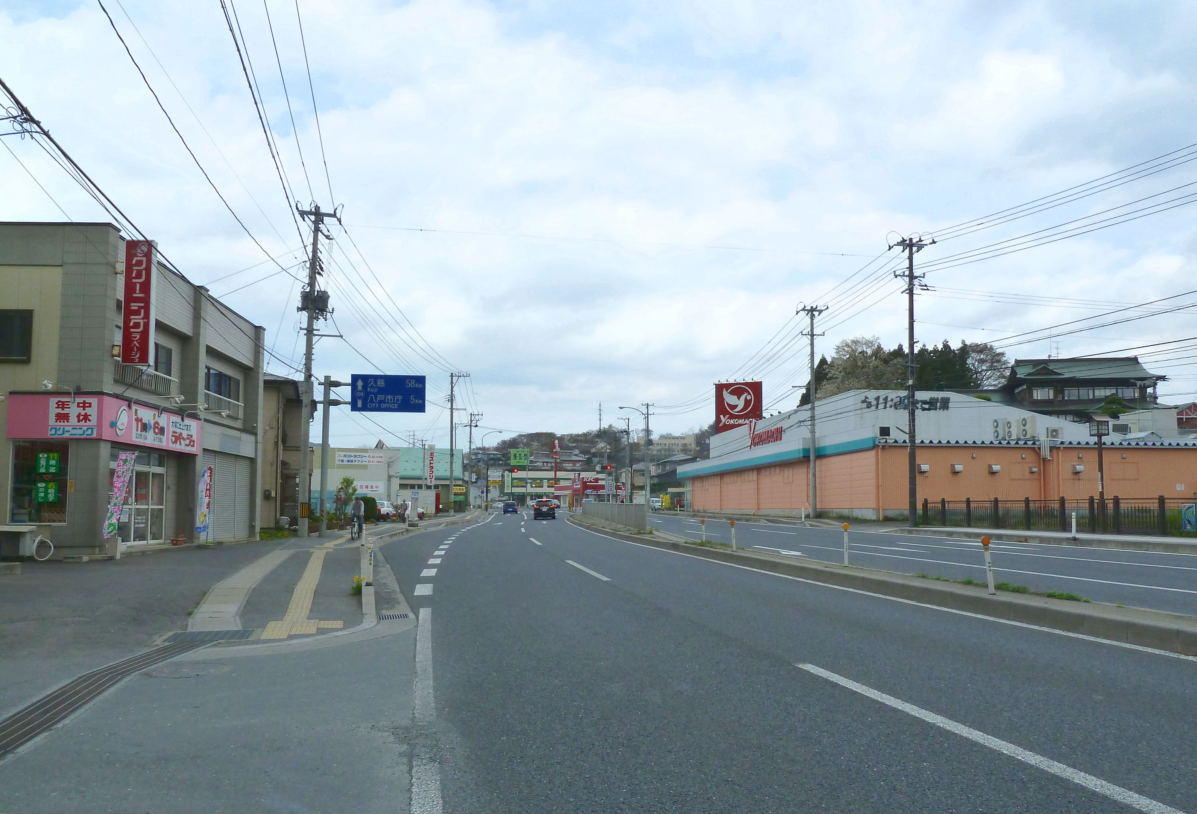 八戸市内を走る国道104号